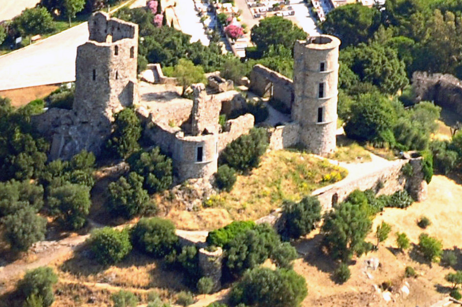 Vue aérienne du Château de Grimaud